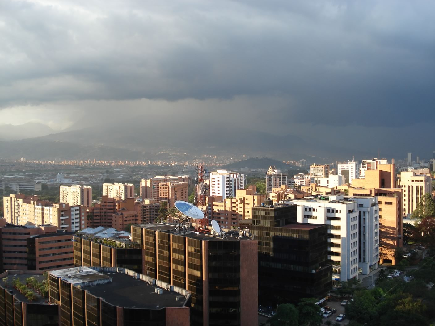 Medellín, Colombia